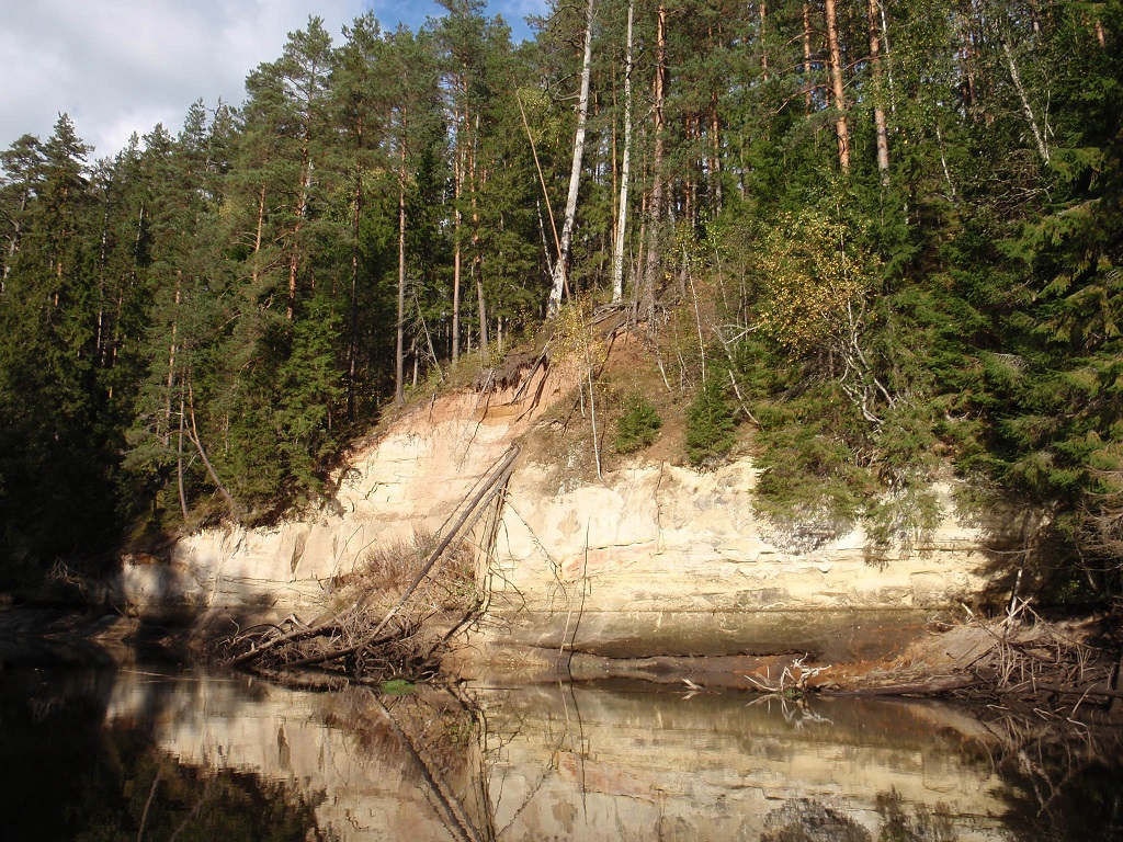 Palanumäe paljand 2015 septembris langetatud veetasemega